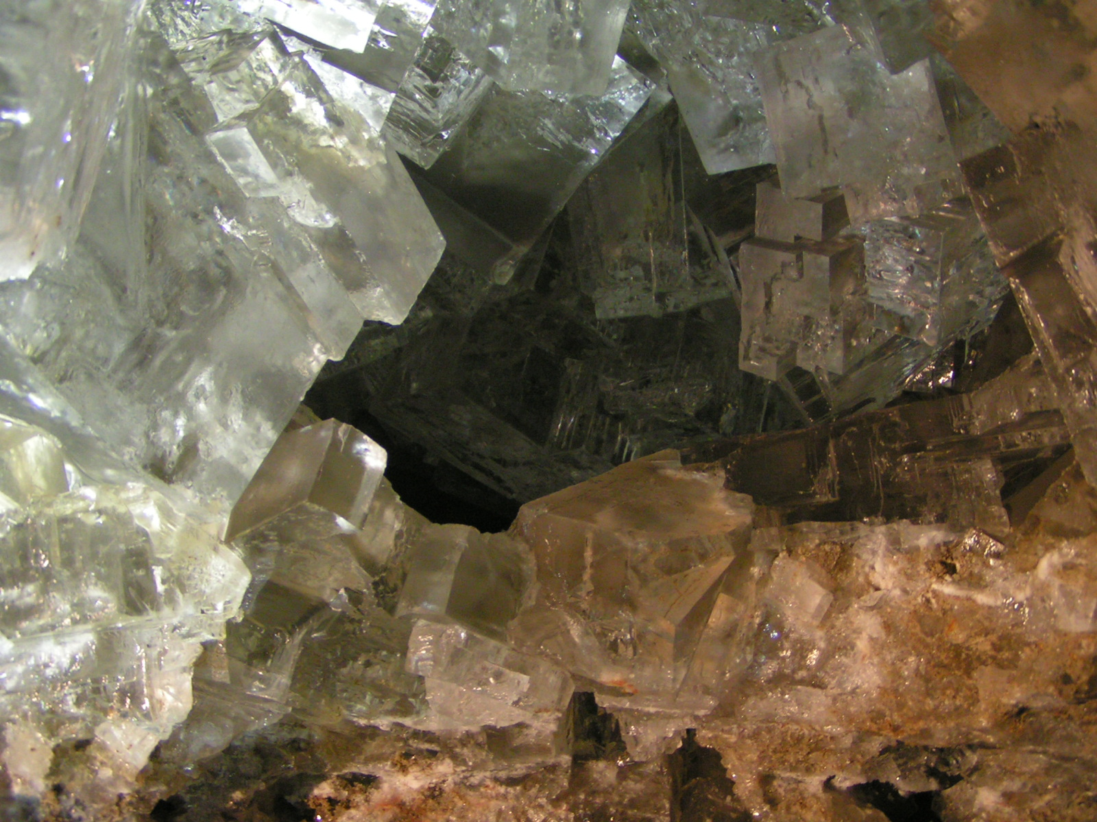 Salzhöhle mit fast perfekten Halitkristallen in der Grube Wieliczka